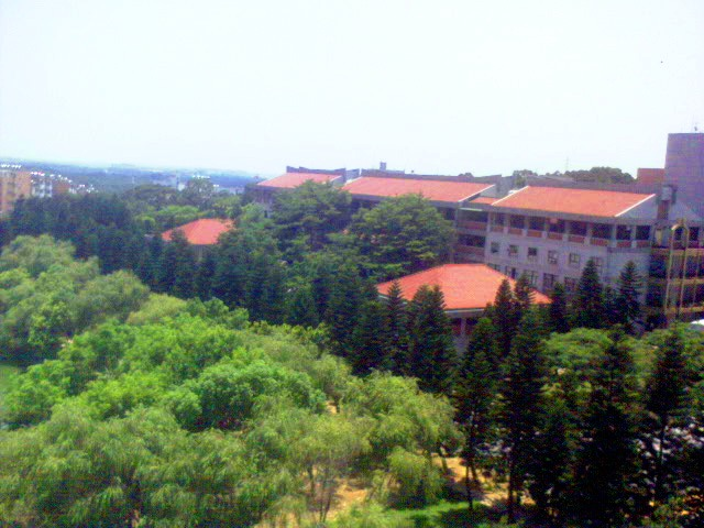 臺灣新竹中華大學的建築規劃學院館樓